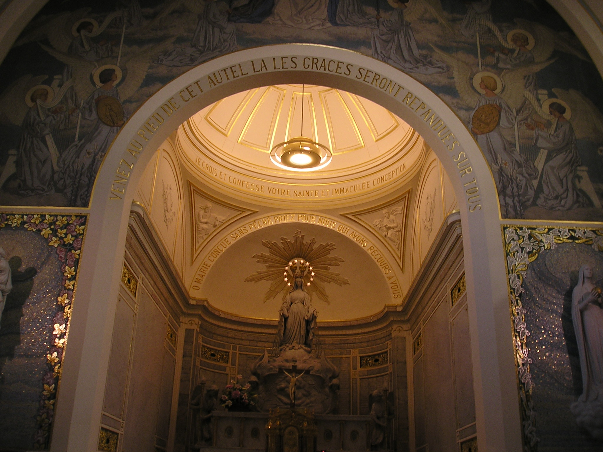 Description du contenu=Chapelle de la Médaille Miraculeuse, Autel 2 Source=« œuvre personnelle » Date=29-07-2006 Author=André Leroux Permission=œuvre personnelle,libre de droits(domaine public)